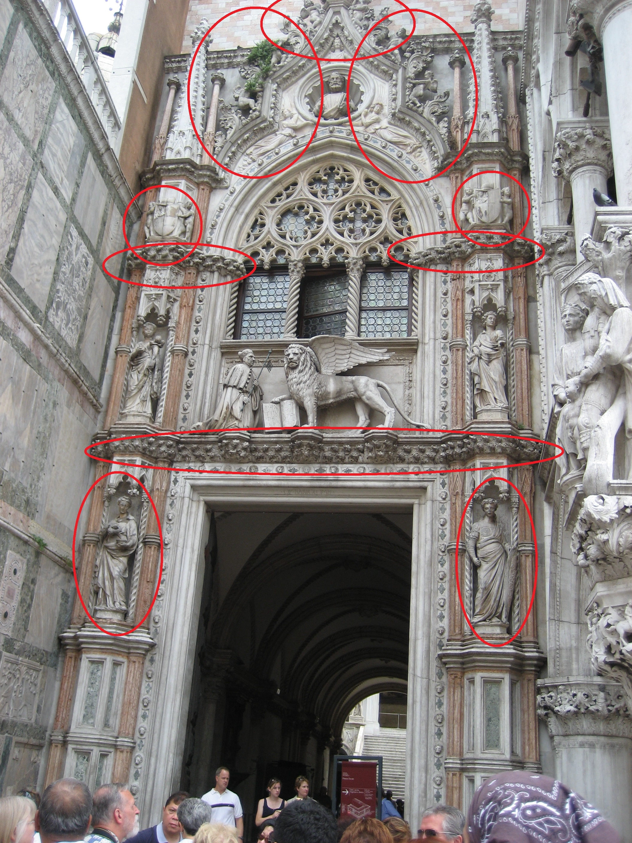 Modifica dell'immagine "File:Venice Scene 13.jpg" (di Forrestn) presente in Commons, al fine di evidenziare le sculture attribuite dalla critica moderna a Giorgio Orsini (Giorgio di Zara, Giorgio di Matteo, Giorgio di Sebenico)